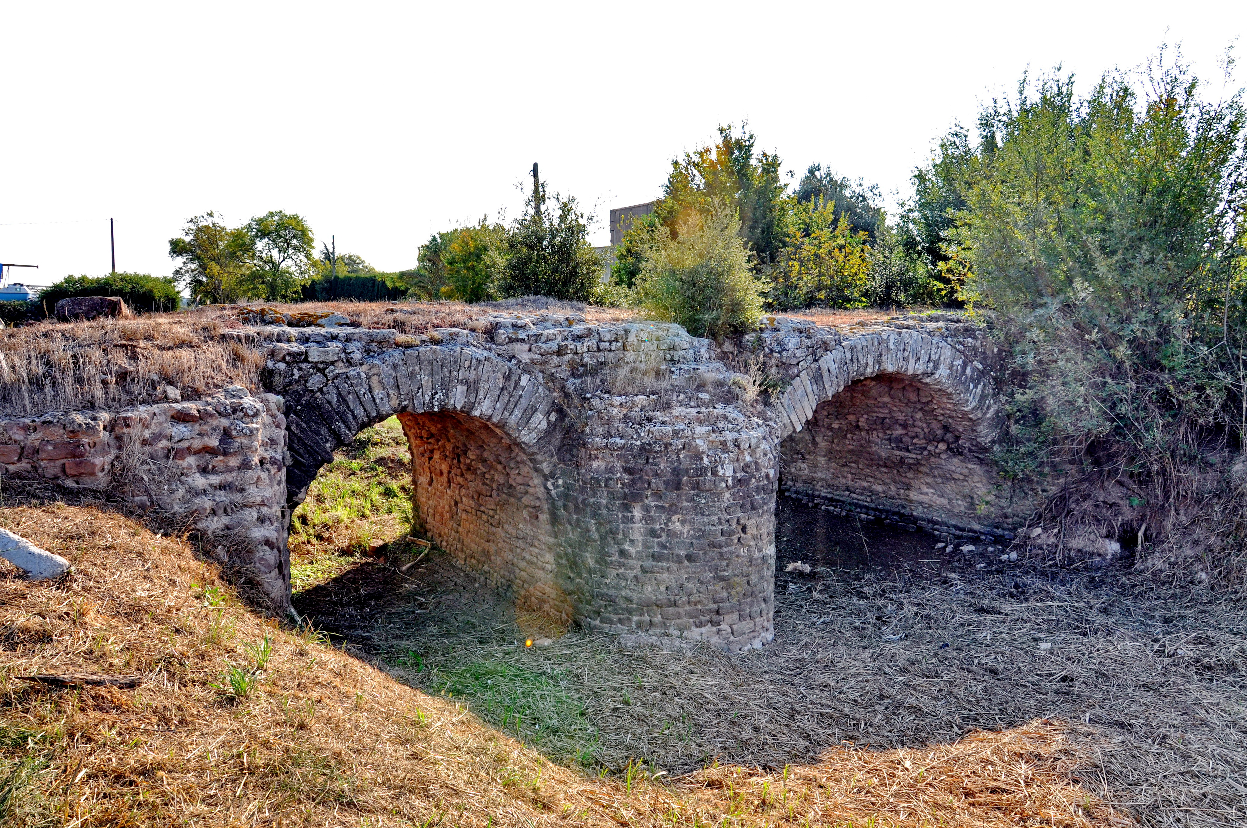 Pont romain des Esclapes